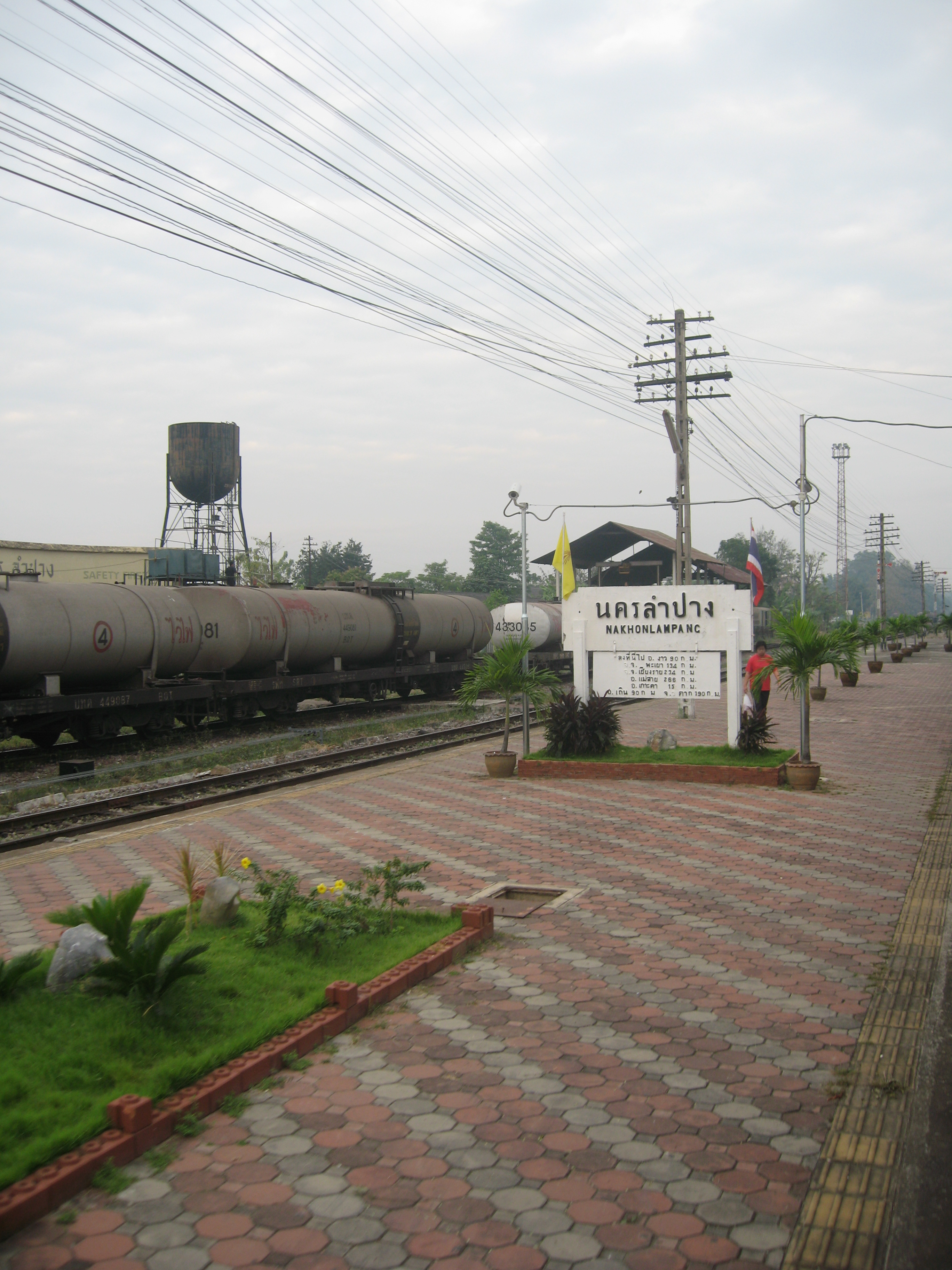 สถานีรถไฟลำปาง